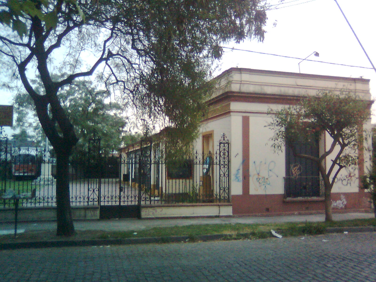 Antigua construcción en la calle Lacroze de Villa Ballester, en la cual funcionó la estación de Tranvías de Lacroze, de 1890 a 1908. Actualmente sede del Grupo Scout "Baudizzone", fundado en 1935.